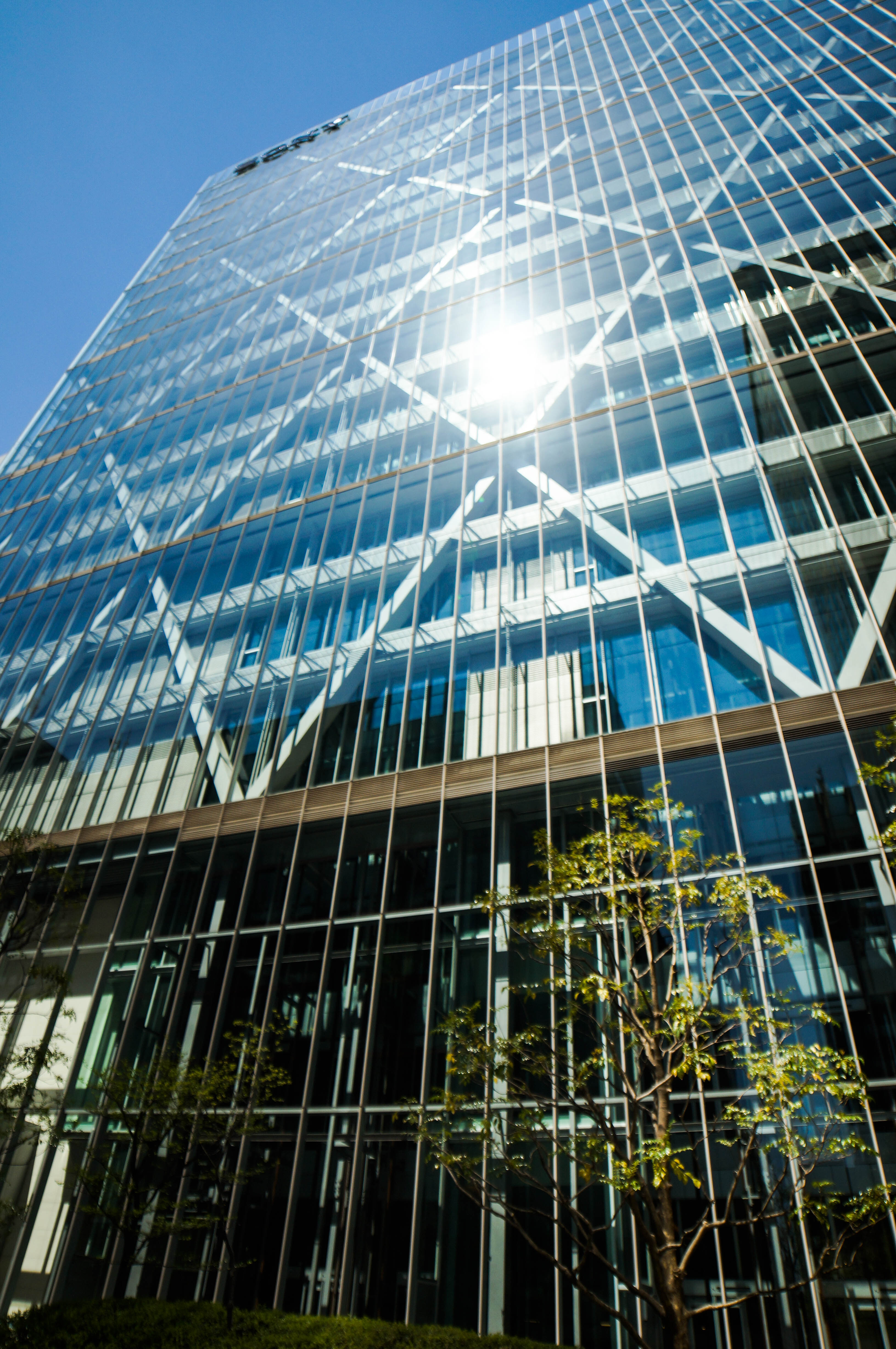 ソニー本社ビル Sony SLT-A57